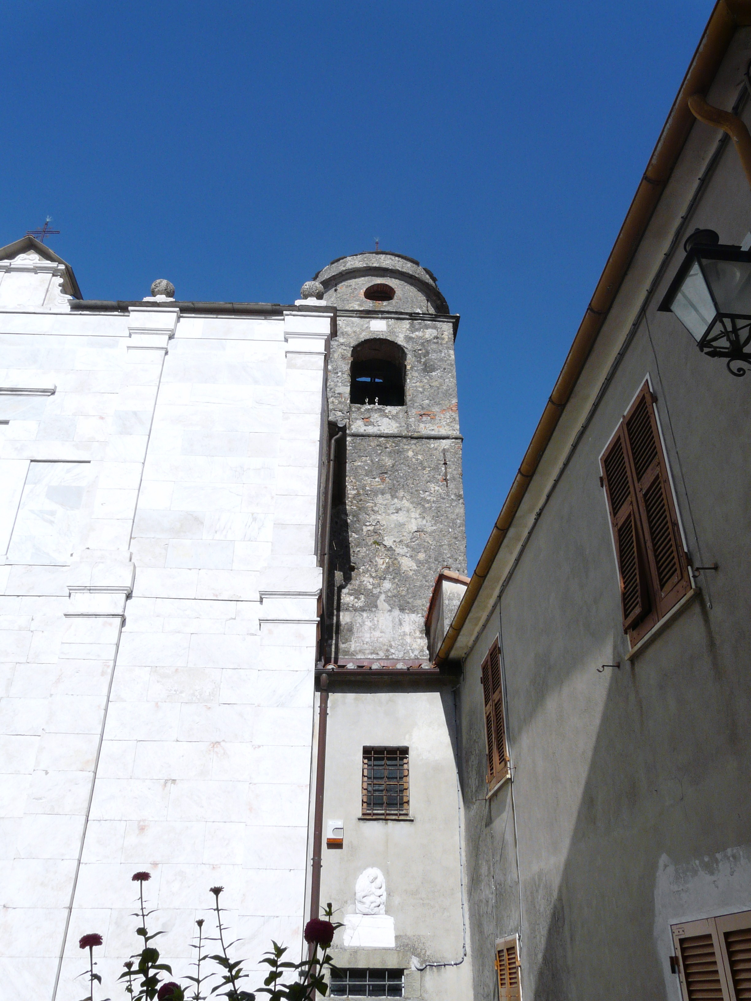 Oratorio dei Bianchi, Fosdinovo, Toscana, Italia